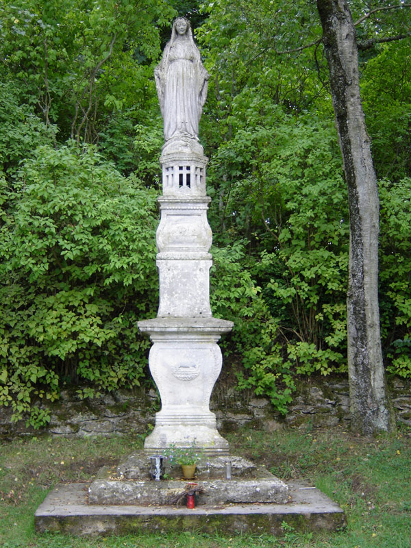 Muttergottes ouni Hänn op der Rollenger Muttergottesknippchen